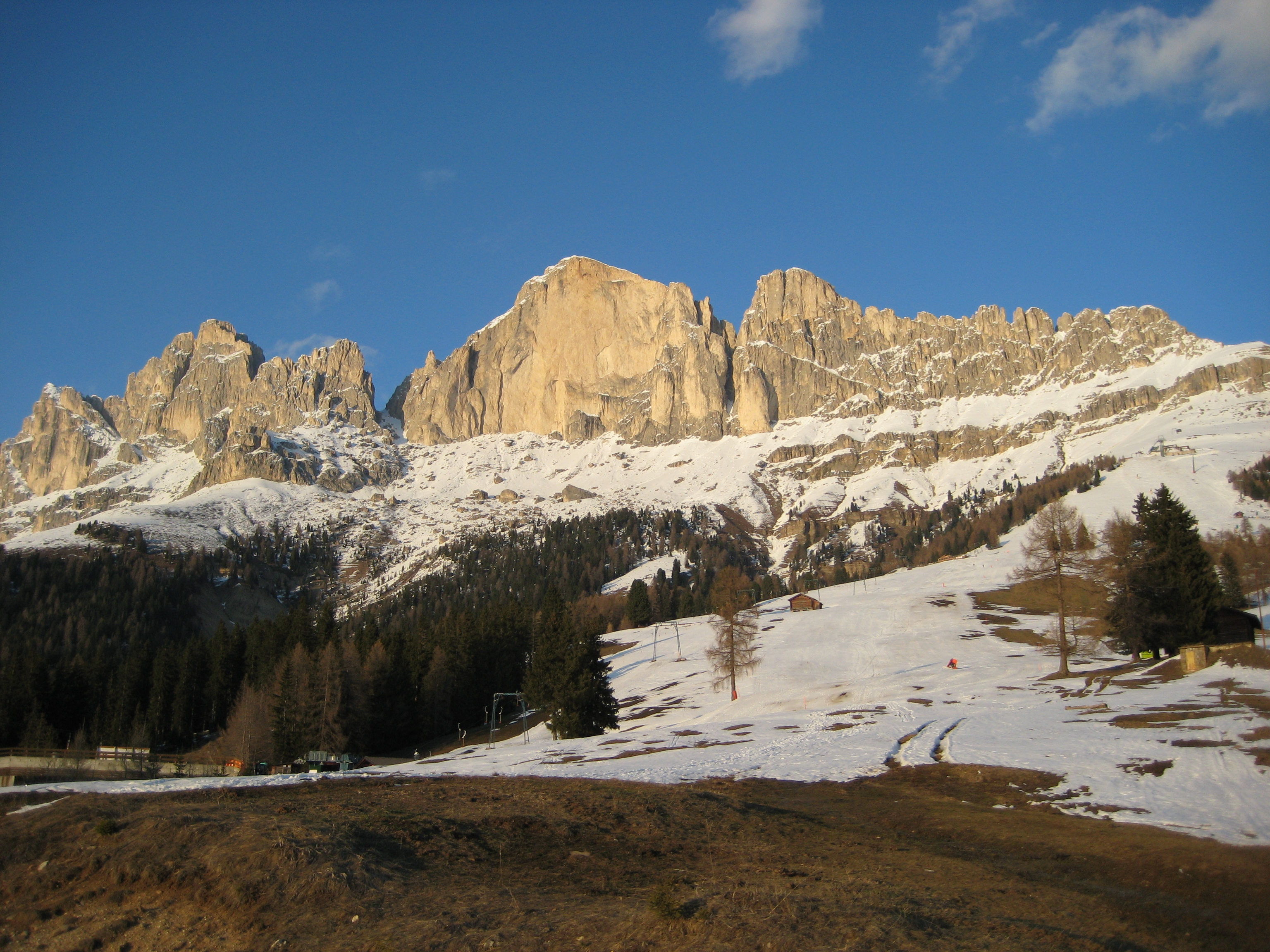 Rosengarten vom Karerpass aus